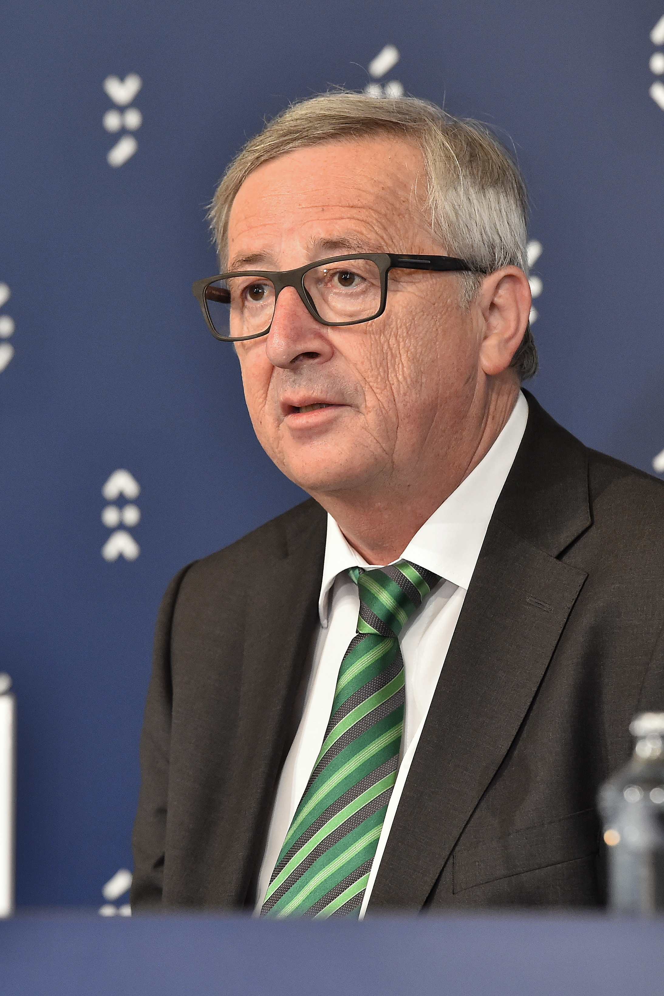 ROBERT FICO, JEAN-CLAUDE JUNCKER PHOTO RASTISLAV POLAK